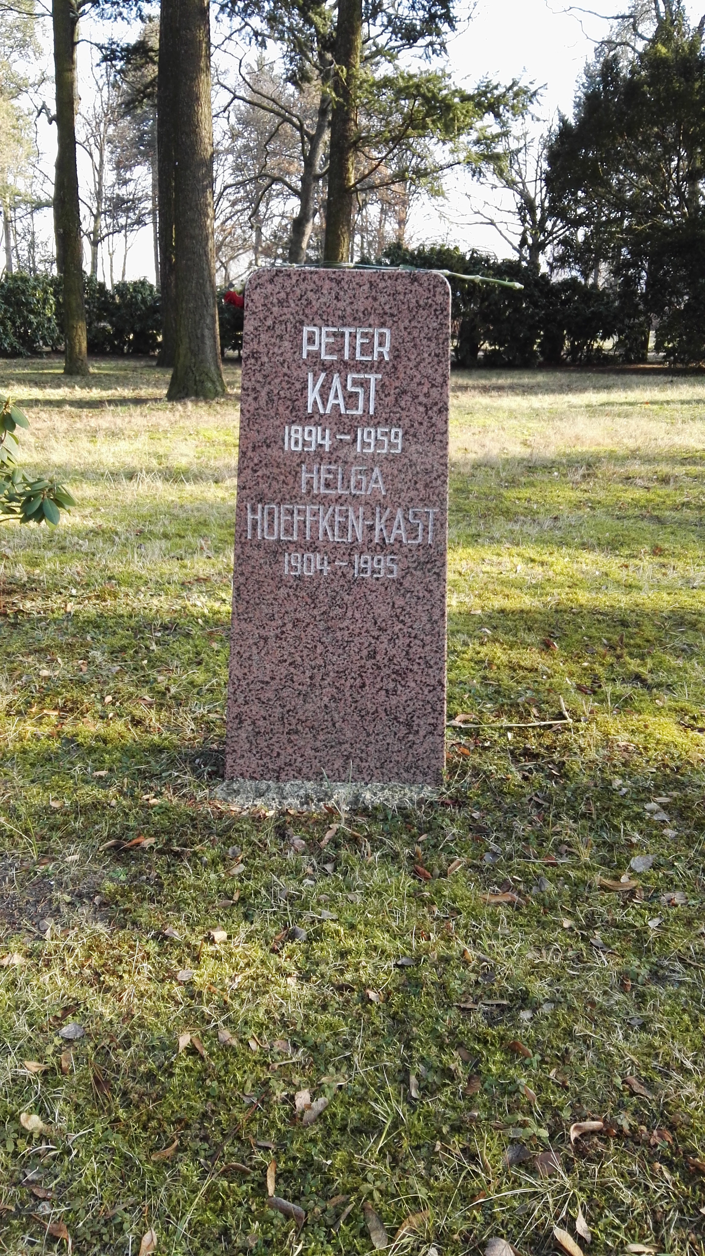 Grab von Peter Kast und Helga Höffken-Kast in der Grabanlage Pergolenweg auf dem Sozialistenfriedhof des Zentralfriedhofs Friedrichsfelde